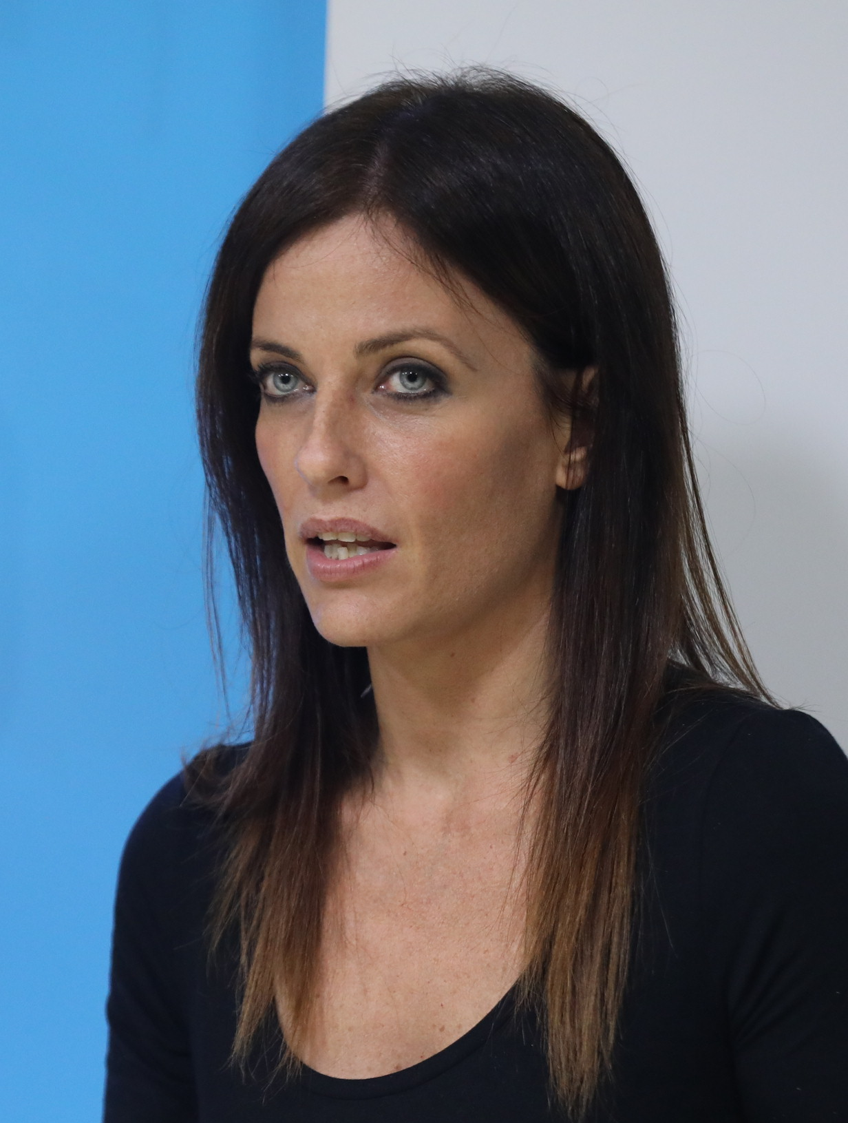 Cake Minuesa, David Enguita, Raquel Sanz, Cristina Seguí y Carlos Garcia. Sala de Tuits: Ataque en las Redes.